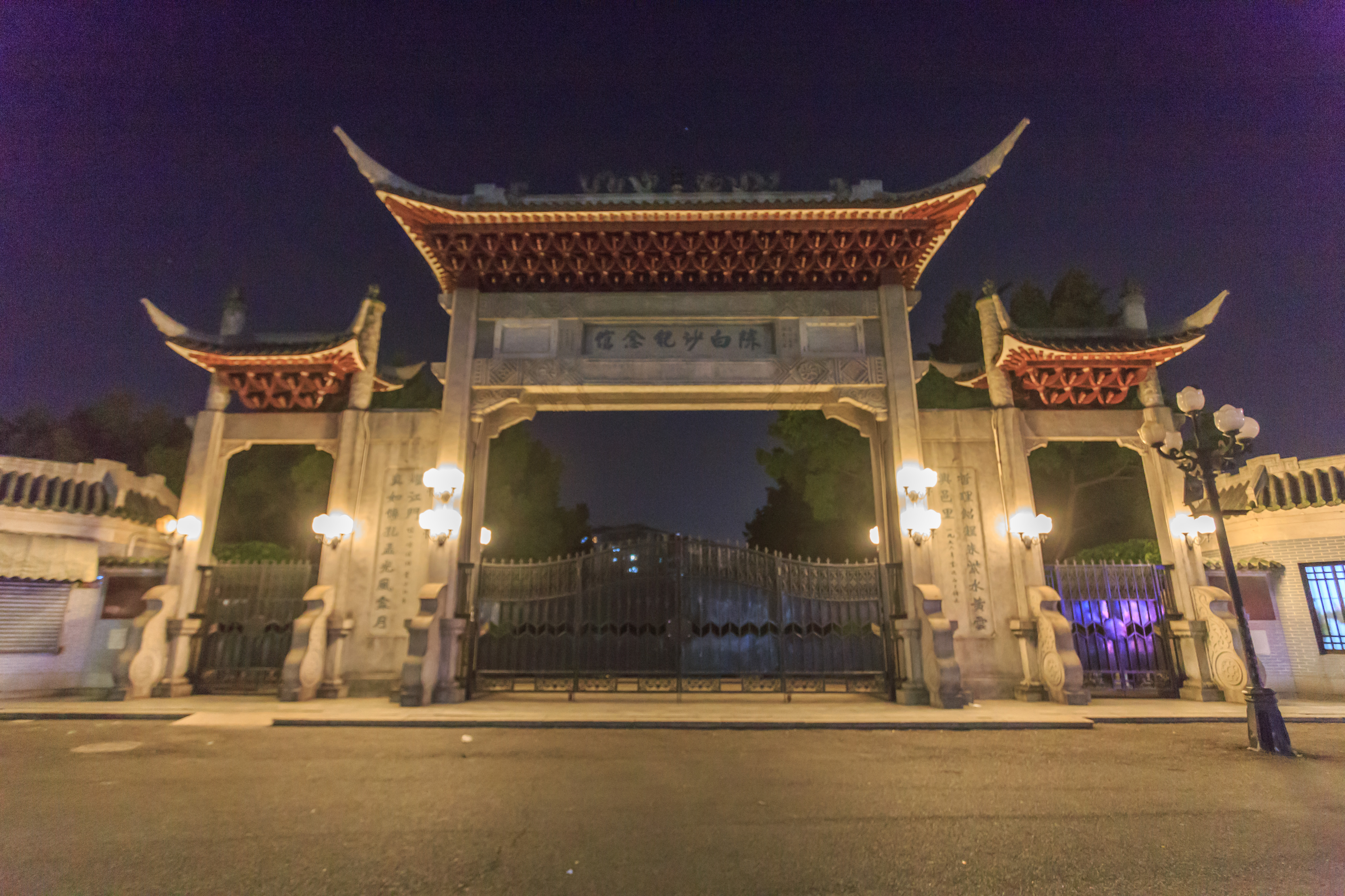 江门市陈白沙祠